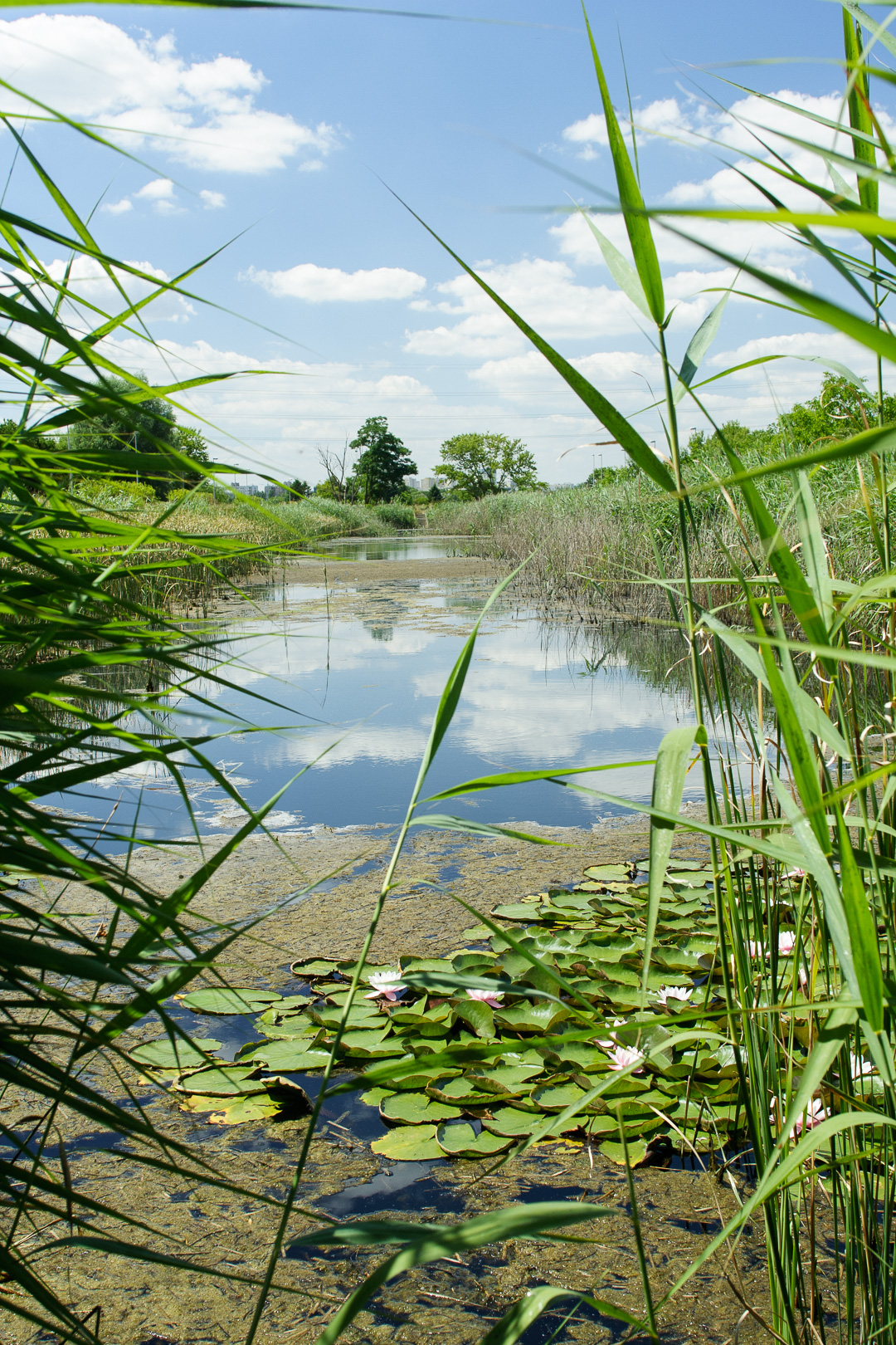 Fosa Wolicka na Mokotowie w Warszawie.